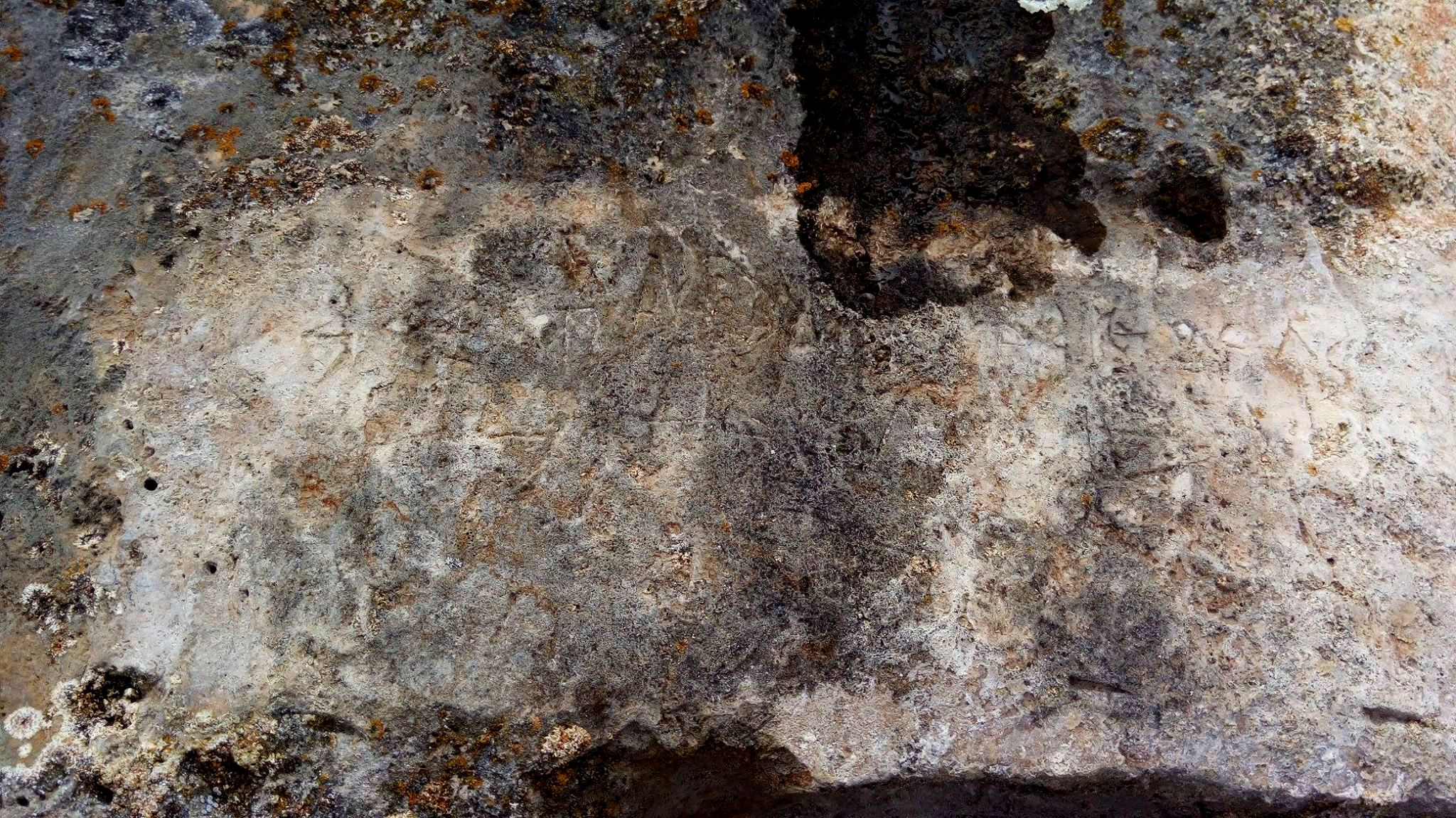 Kripta u selu Rataji kod Miljevine (Foča) - arheološko područje Rataje.